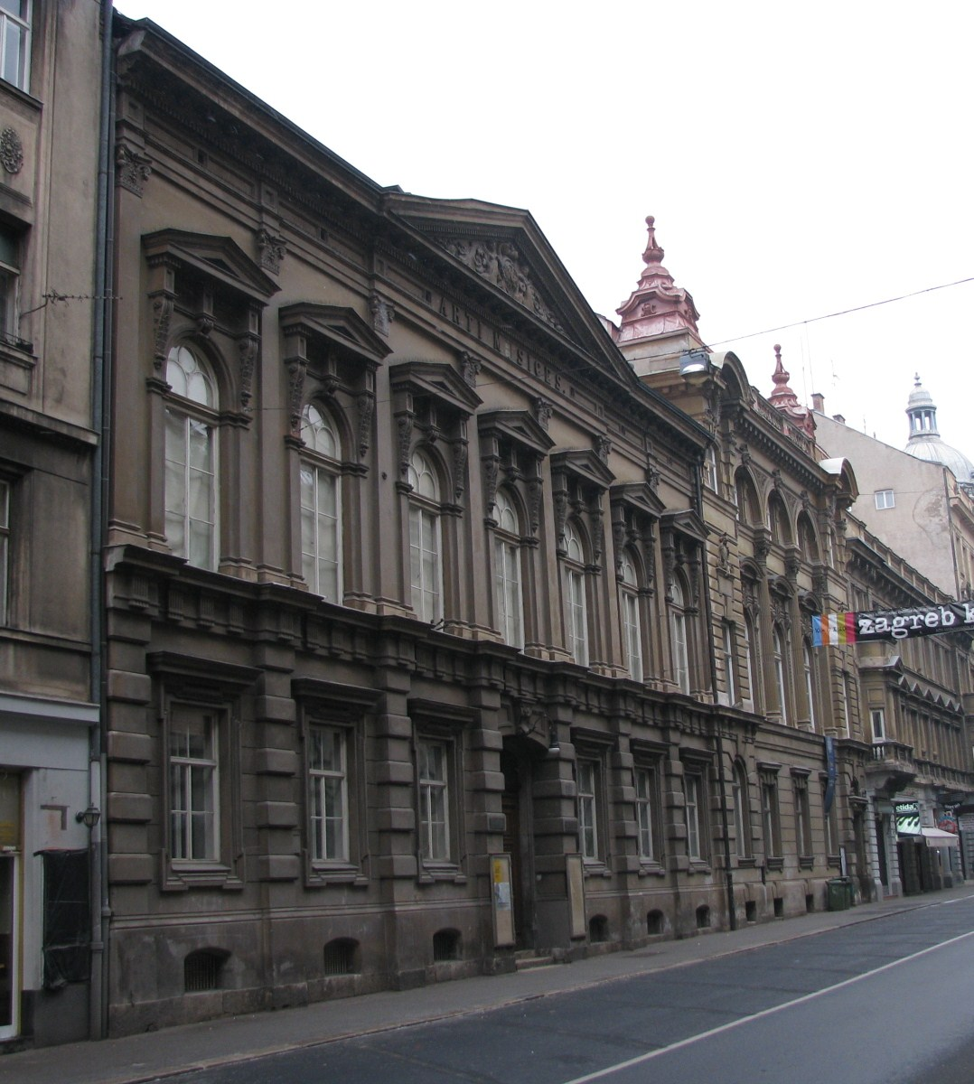 Zgrade Hrvatskog glazbenog zavoda i Muzičke akademije u Zagrebu, u Gundulićevoj ulici